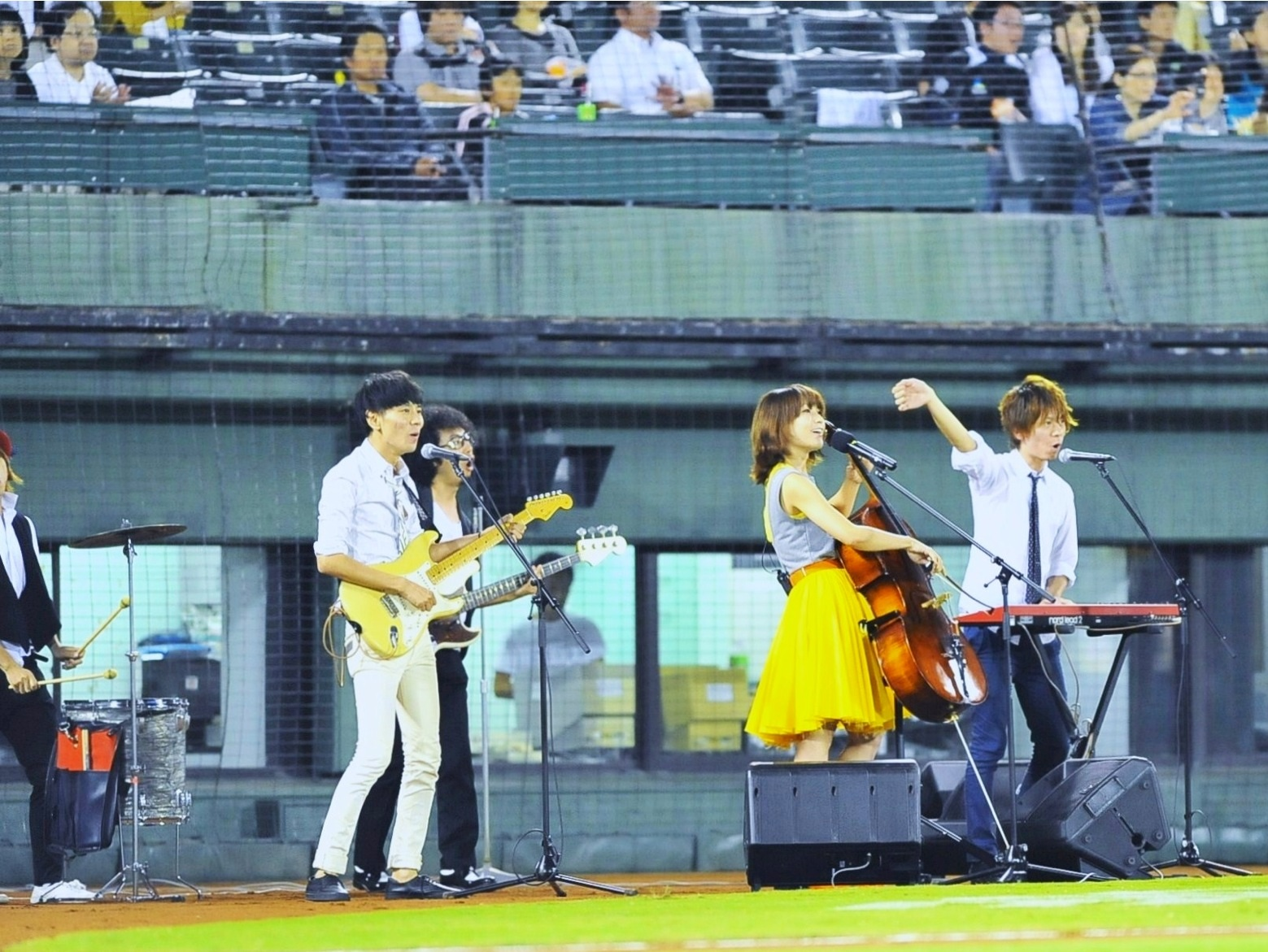 五人組バンド